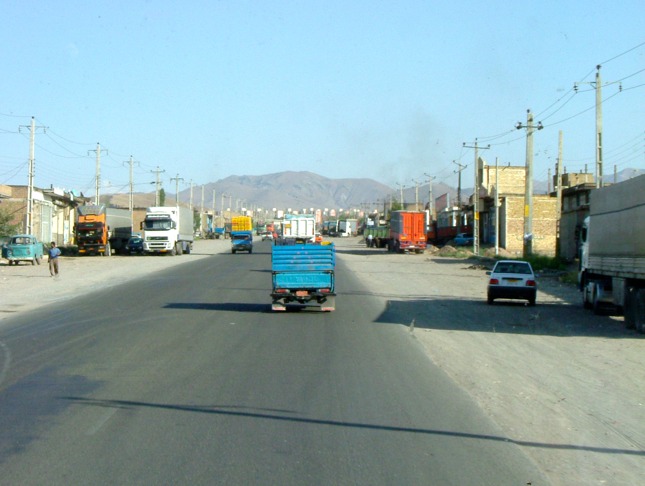 Marand suburb ...